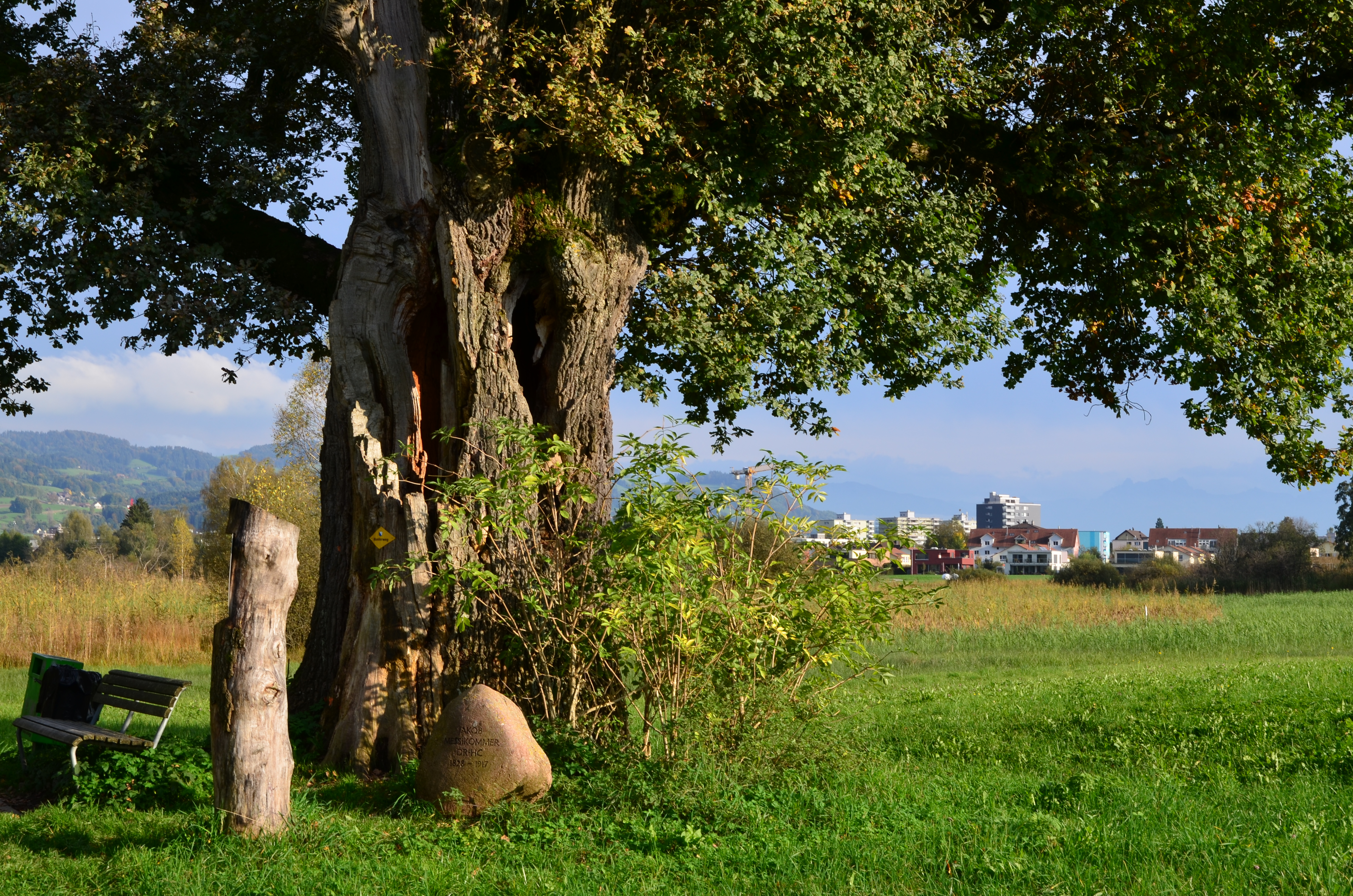 Jakob Messikommer, Robenhausen in Wetzikon (Switzerland) : «Messikomer Eich», 1914 vom Gemeinderat in Seegräben unter Schutz, erhielt die rund 500 jährige Eiche diese Bezeichnung im Jahr 1927.